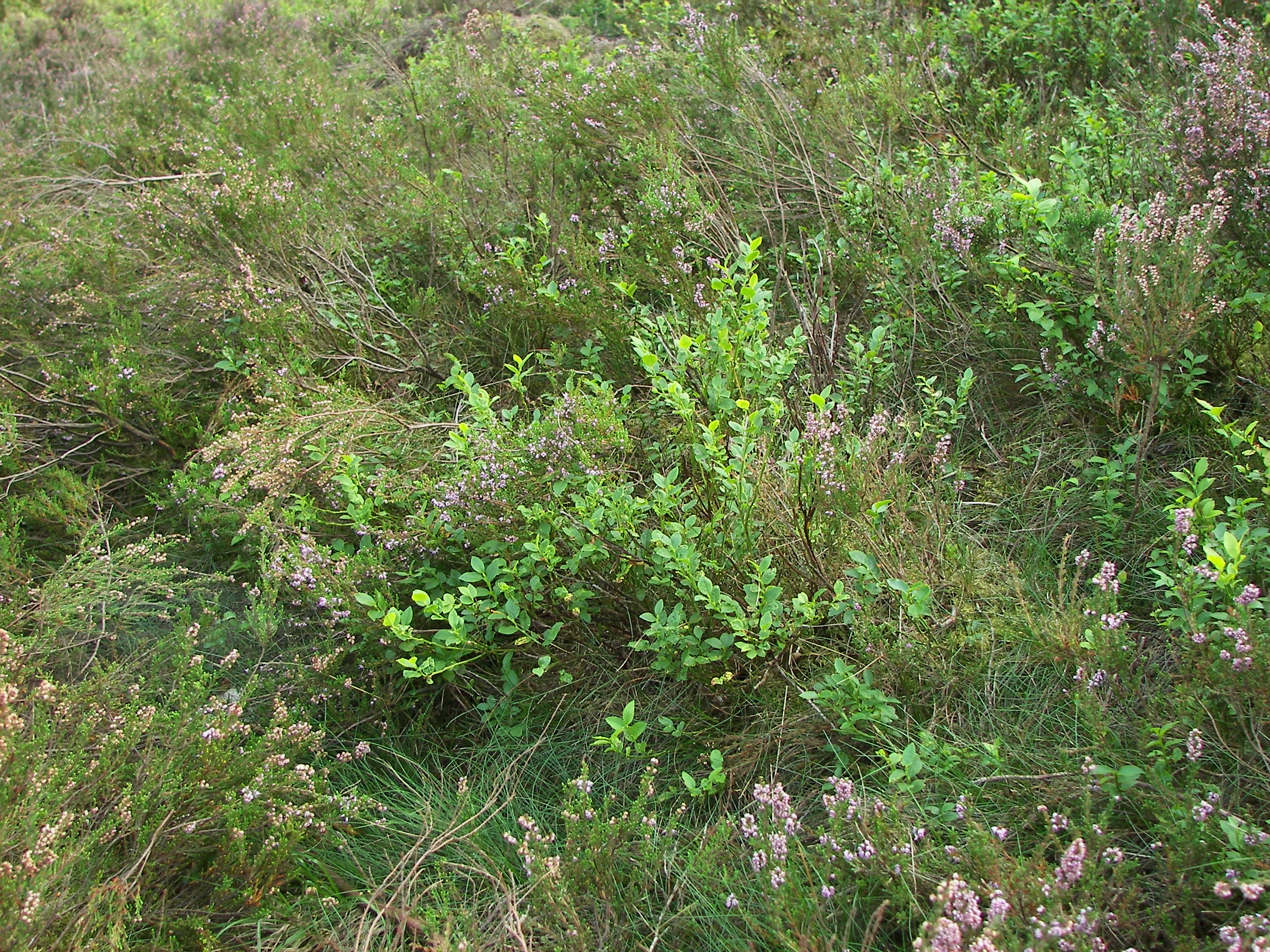 Heidelbeer-Sandheide bei Niederhaverbeck